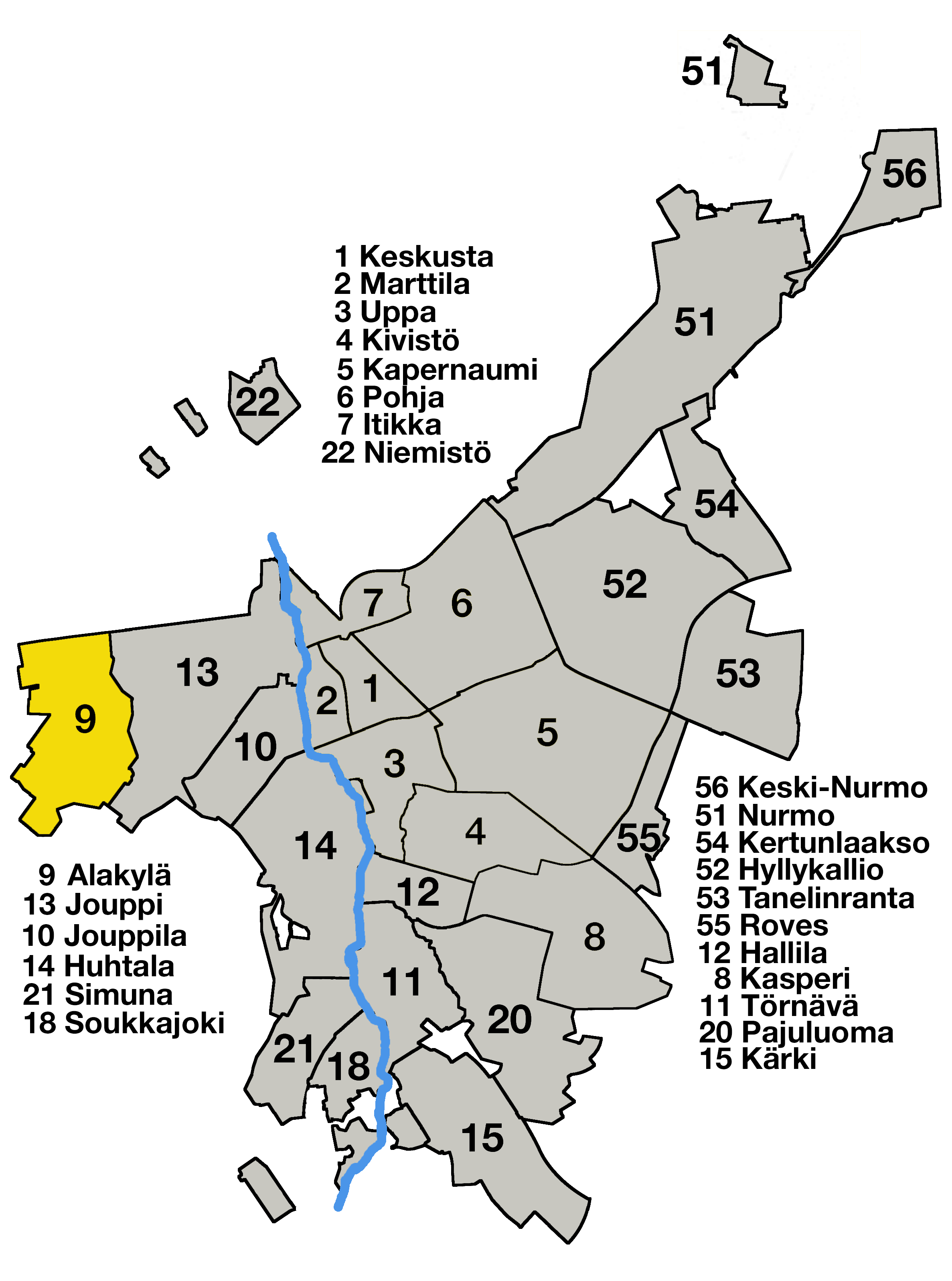 Seinäjoen kantakaupungin kaupunginosat, 9 Alakylä